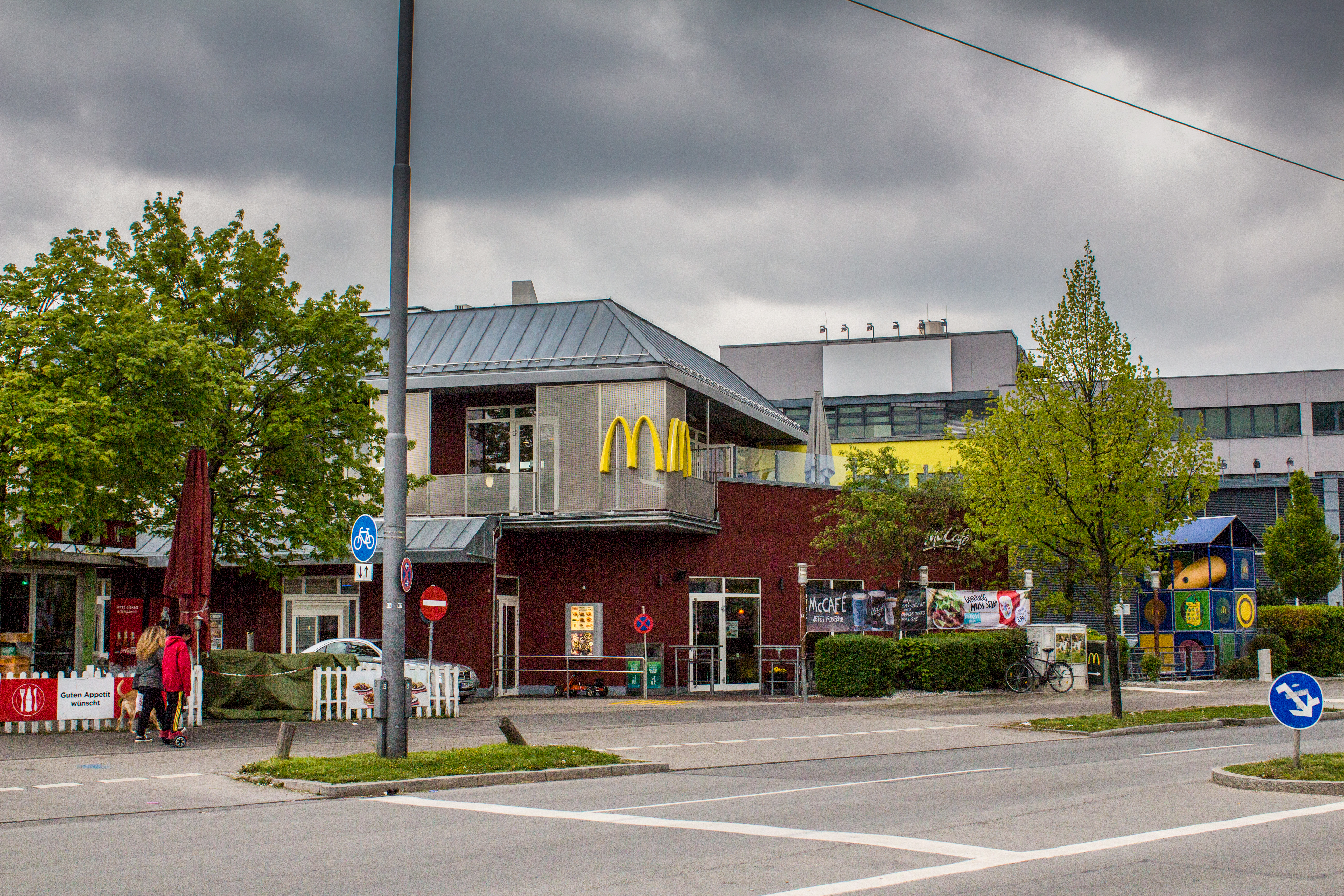 McDonald's-Restaurant in der Hanauer Straße 83 in München.